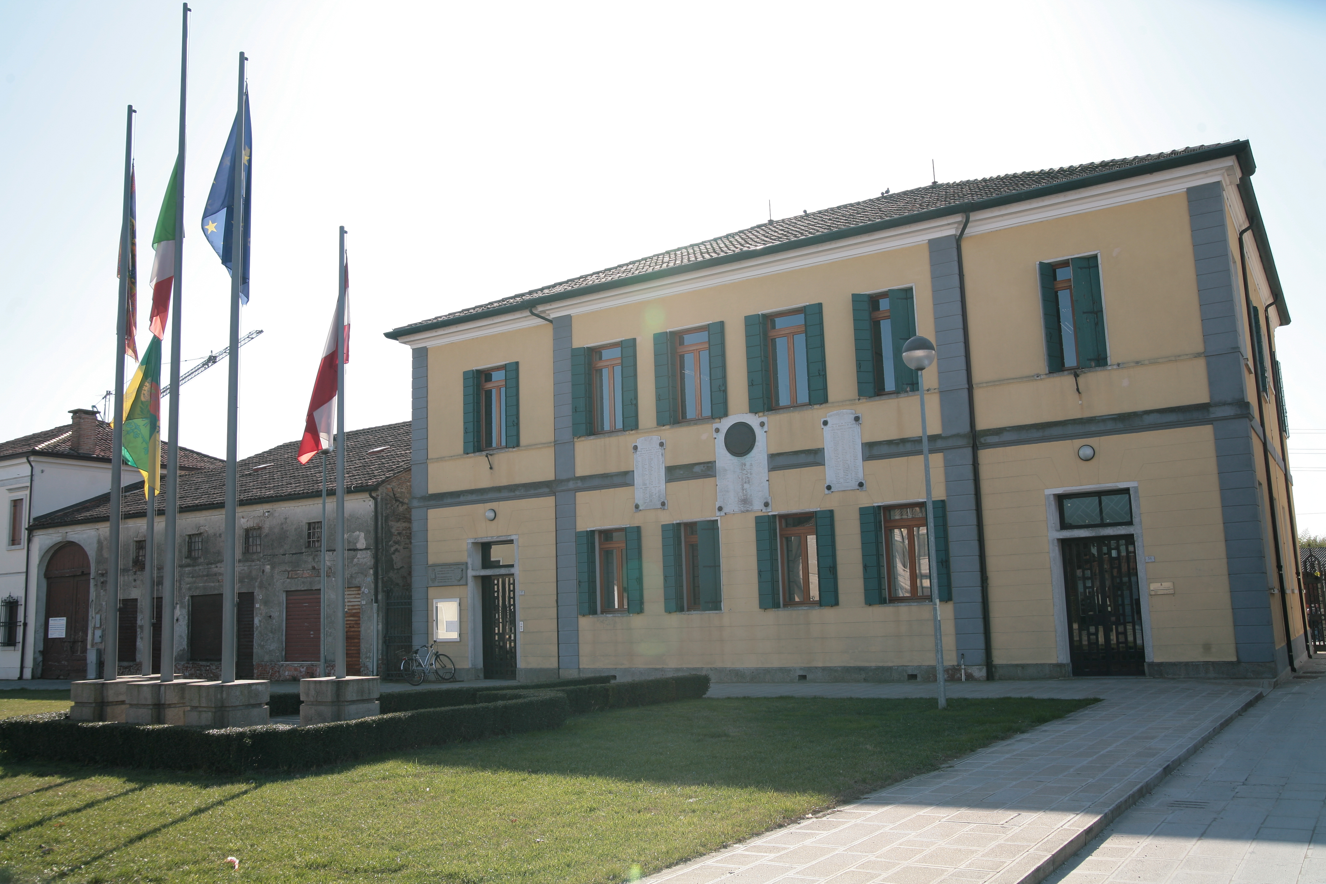 Municipio Bagnoli di Sopra